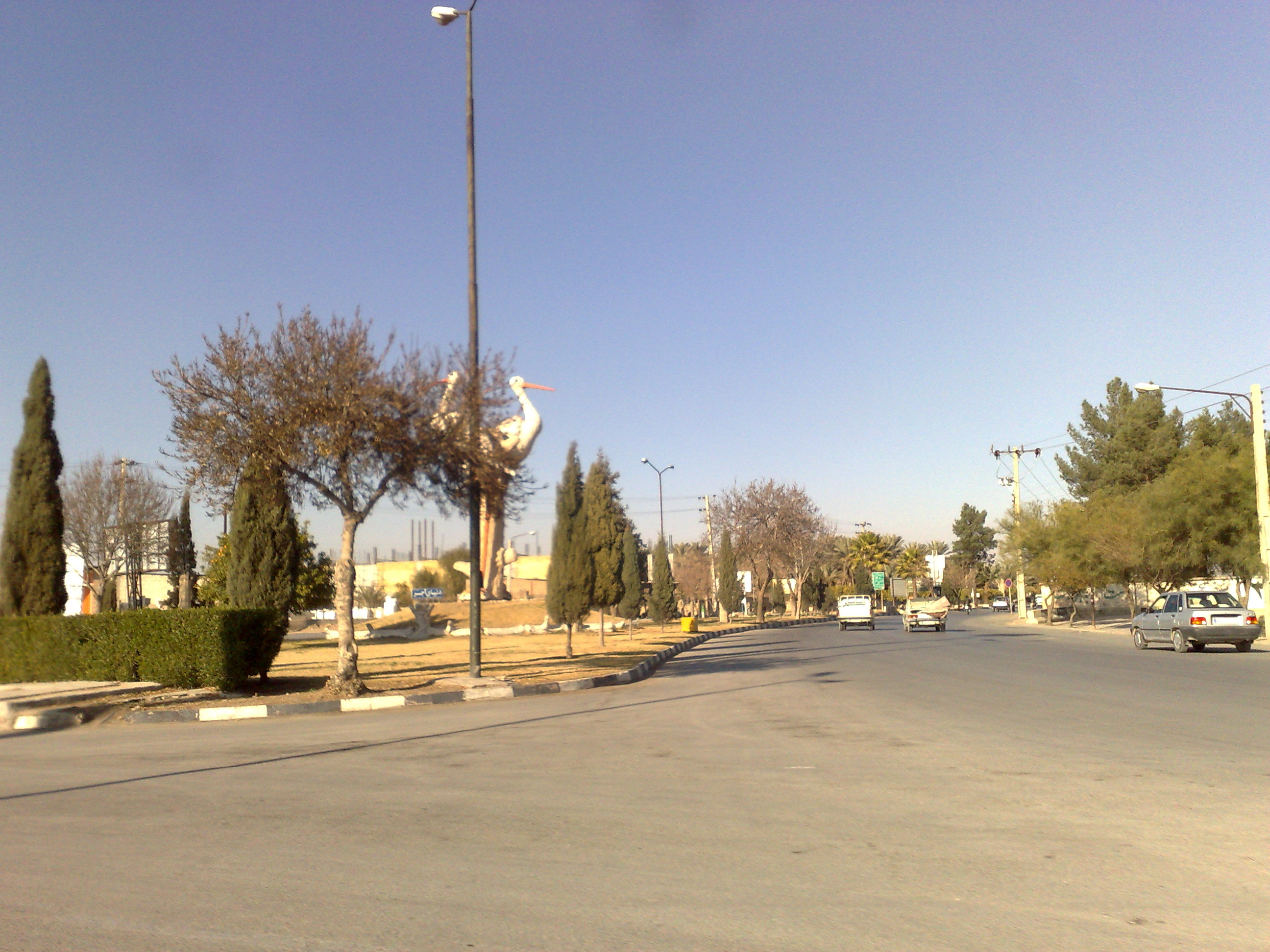 میدان لک لک جهرم(میدان چمران)